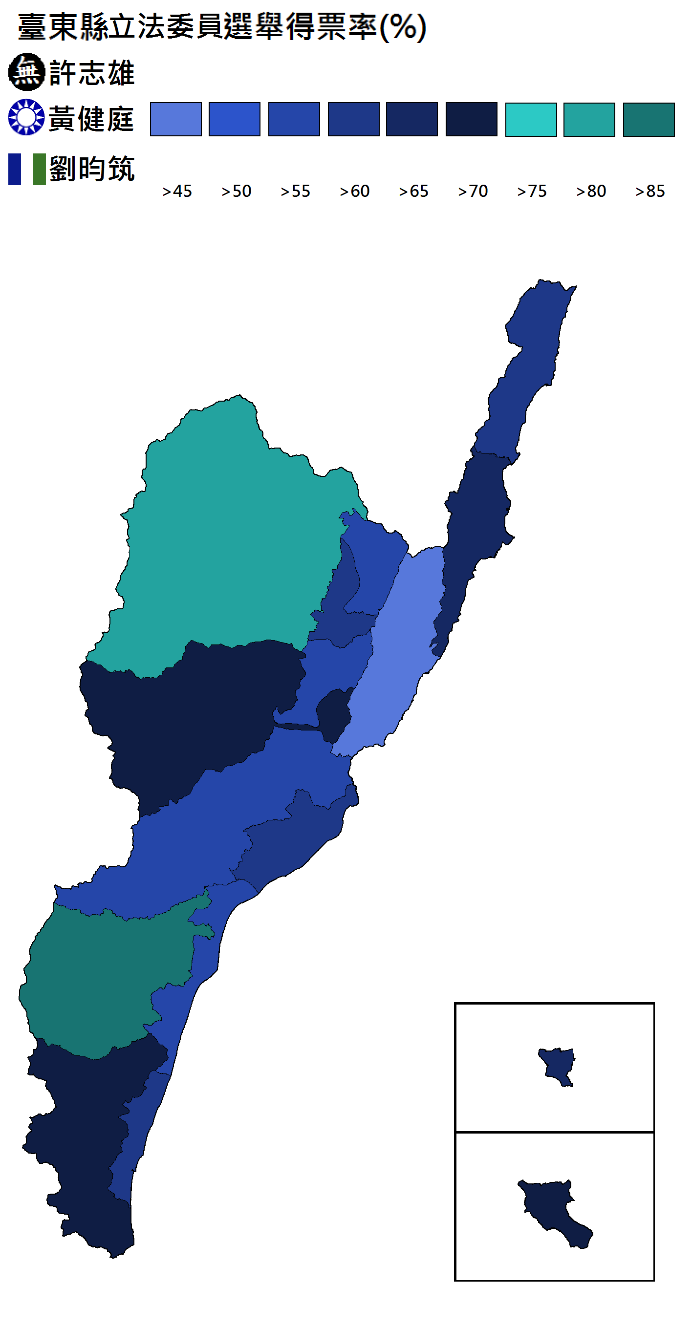 2008立委選舉